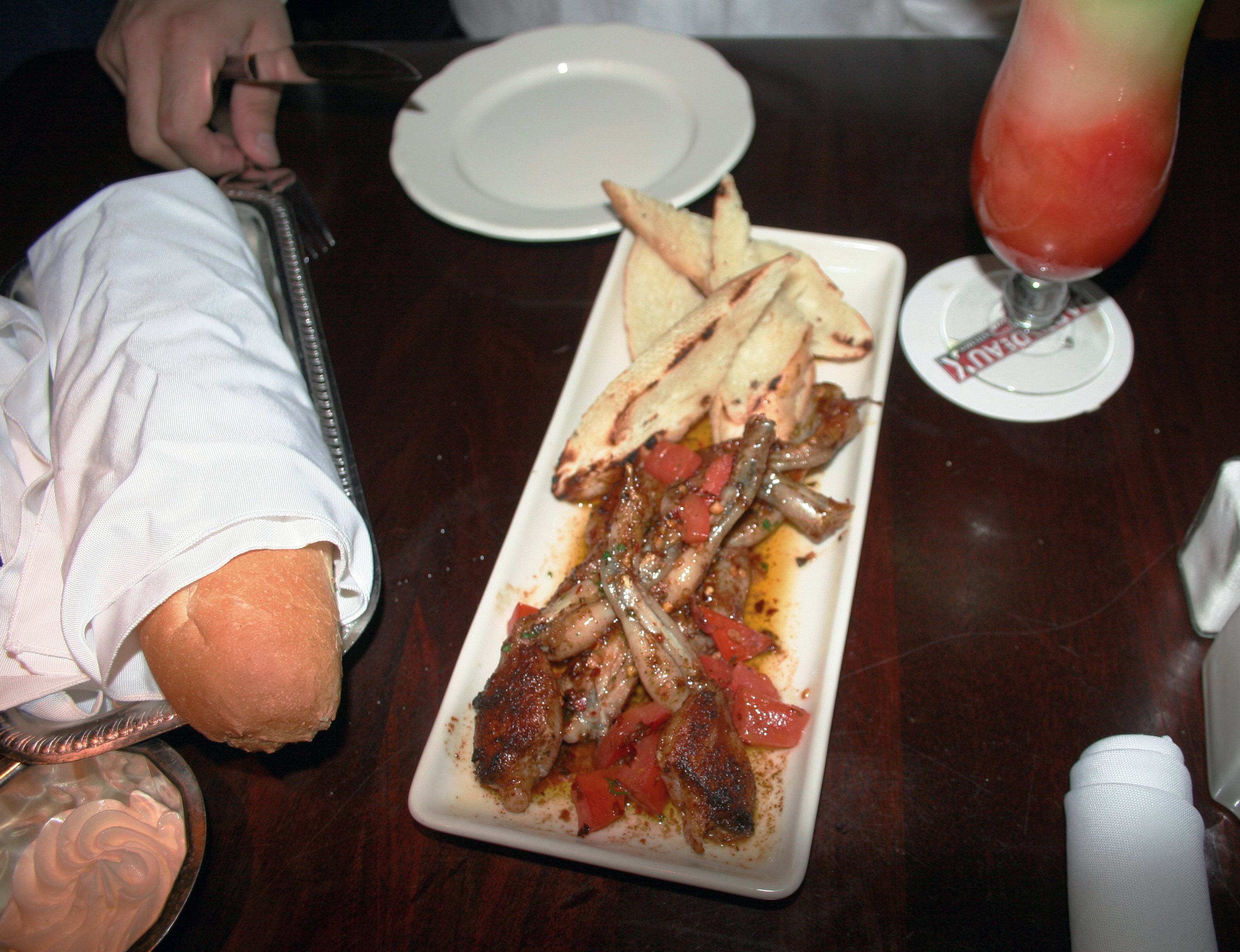 پای قورباغه در رستوران پاپادوکس در تگزاس